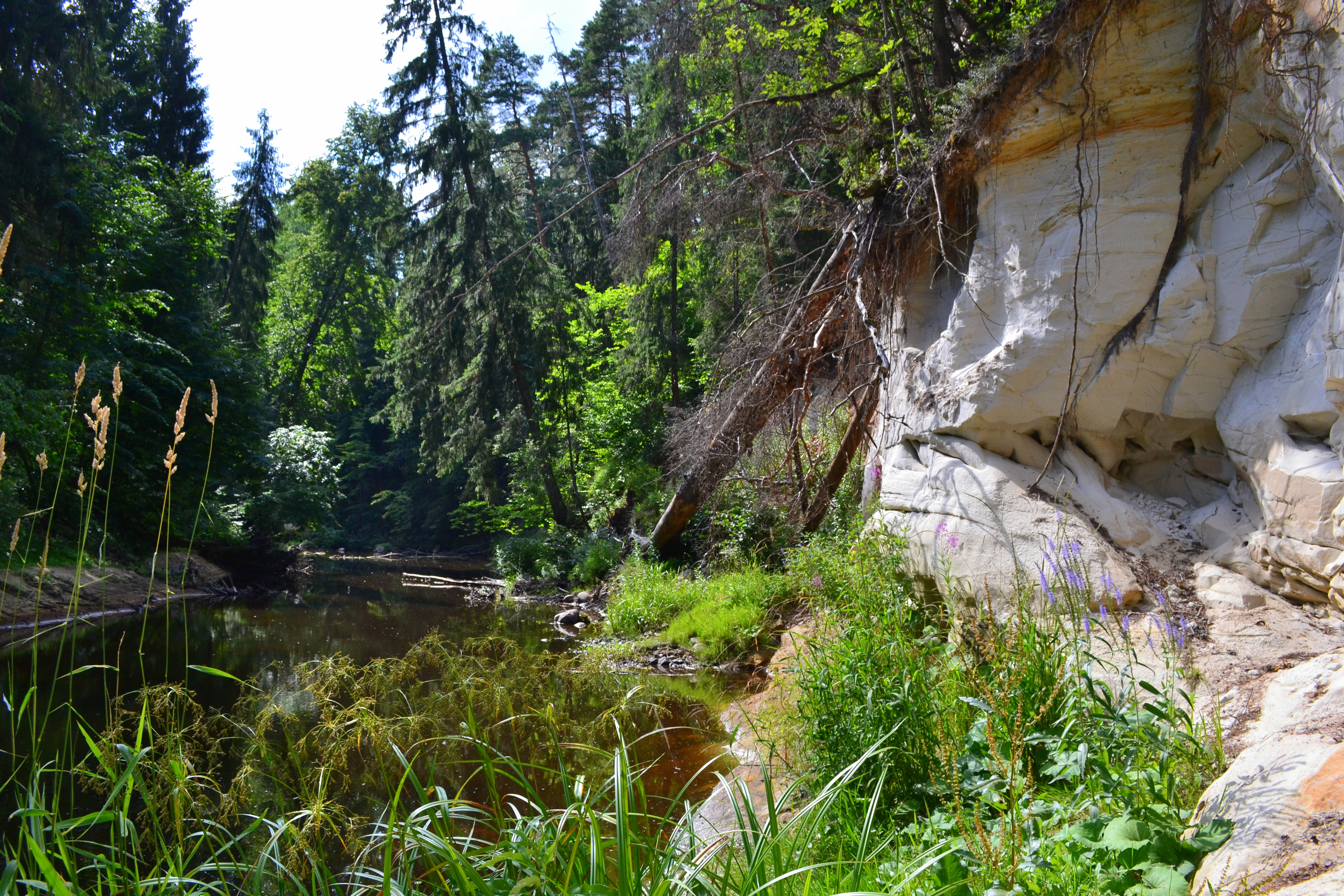 Peetri jõe liivakivipaljand.